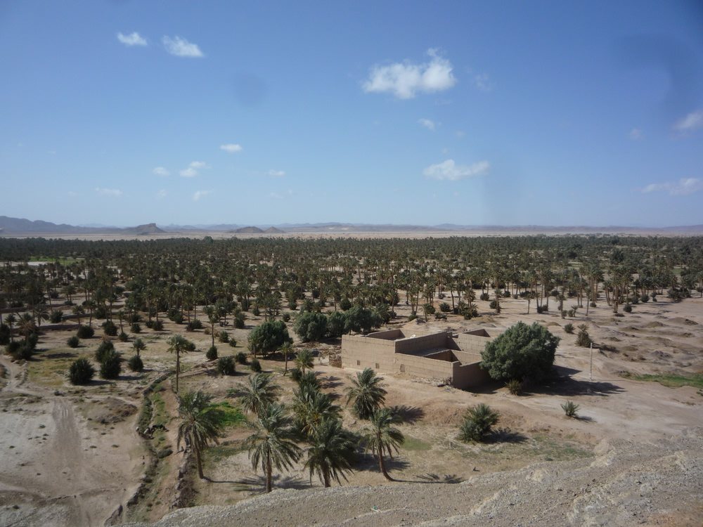 Oasis de Tafilalet vue du ksar de Tingheras